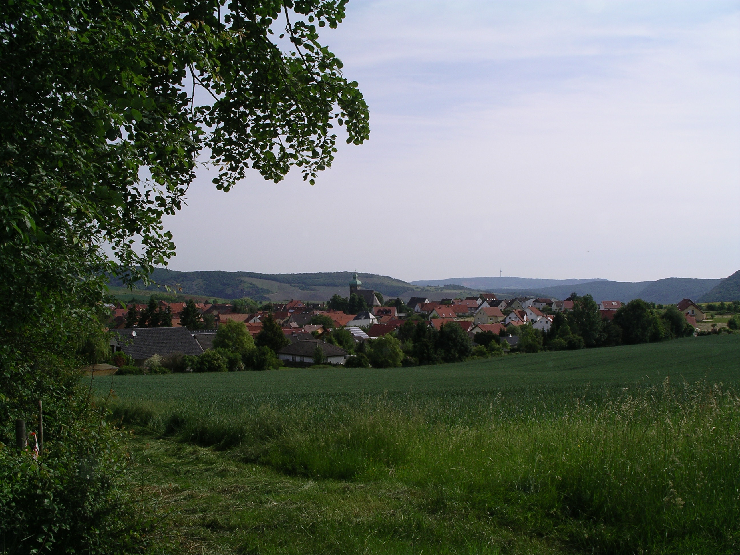 Duchroth, Nahetal, Fernansicht